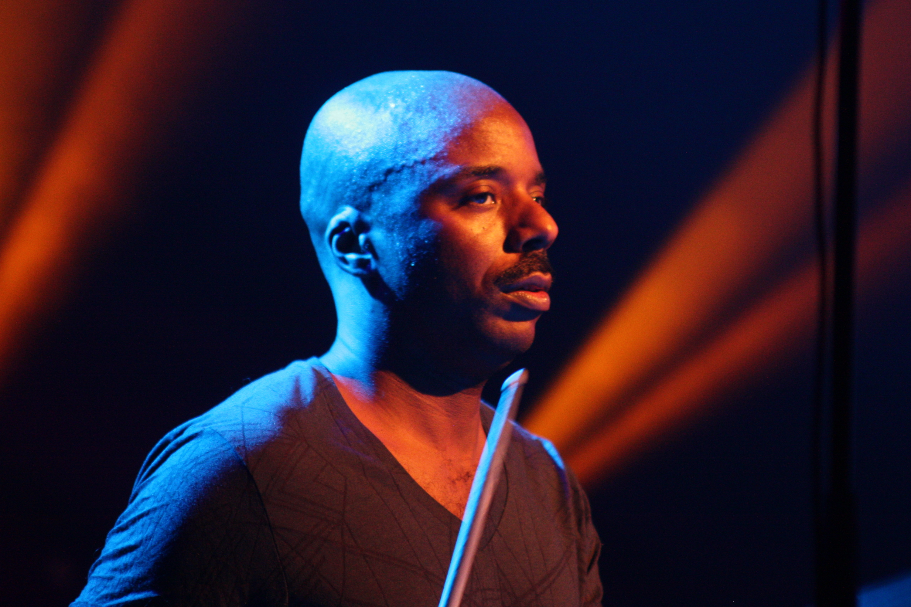 44. Deutsches Jazzfestival Frankfurt 2013: Chad Taylor